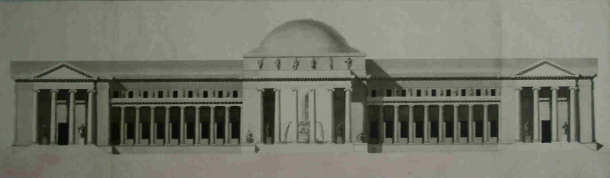 Planche du projet de "Bains publics d'eau minérale" pour le Prix de Rome, par Mathurin Crucy, 1774. Projet lauréat. Elévation de la façade principale.